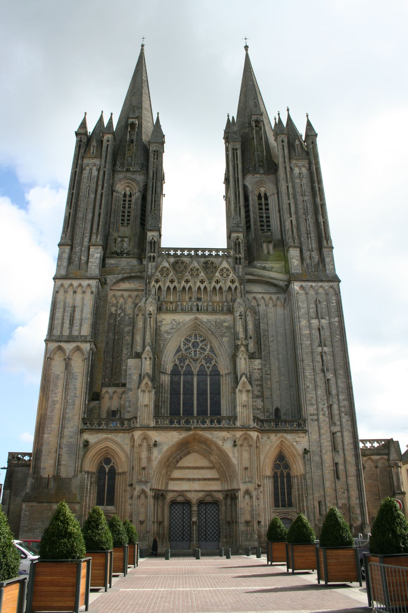 Esplanade de la cathédrale dans sa majesté.